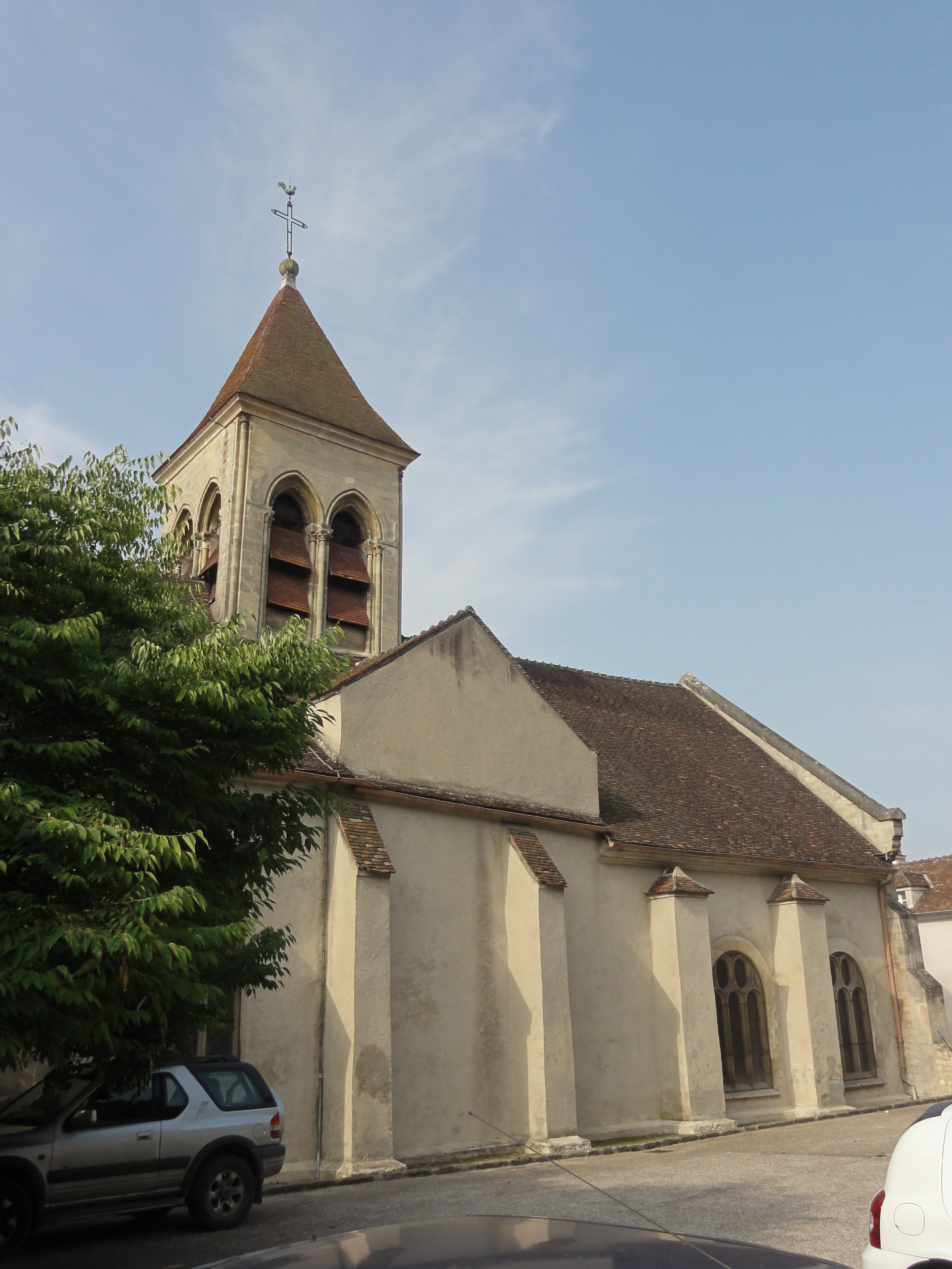 Vue depuis le nord.